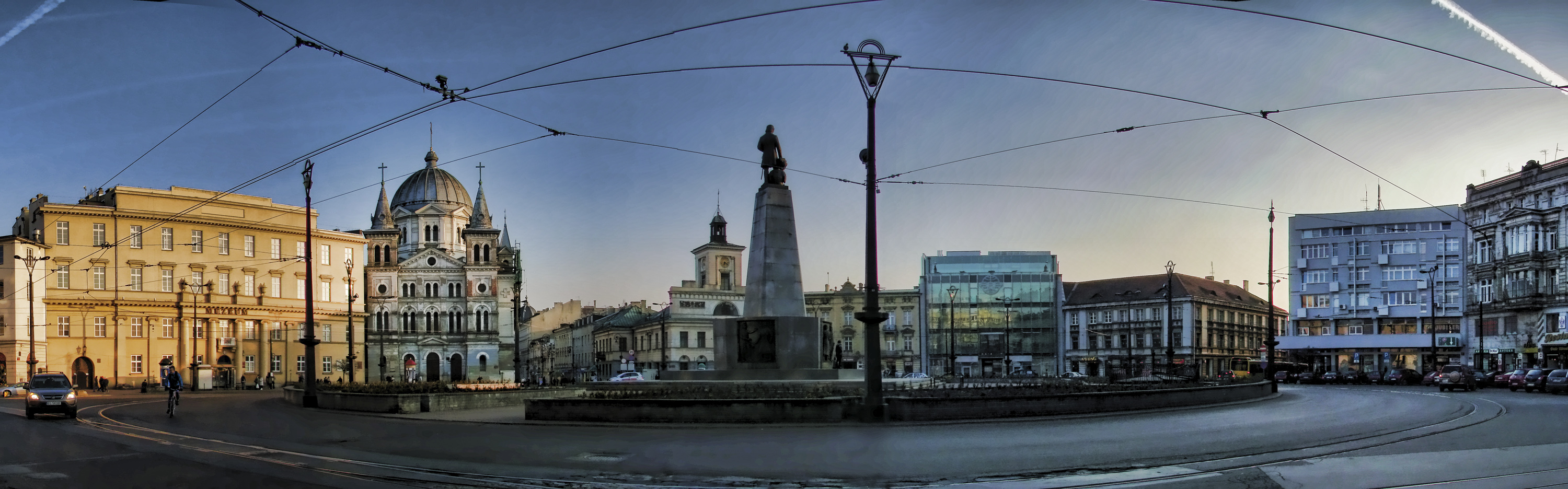 panorama Placu Wolności w Łodzi